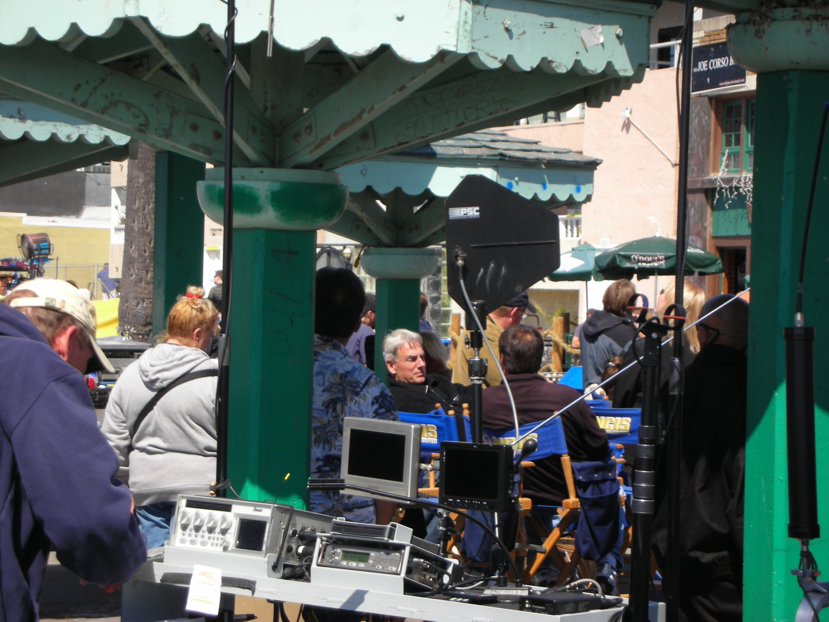 NCIS Filming